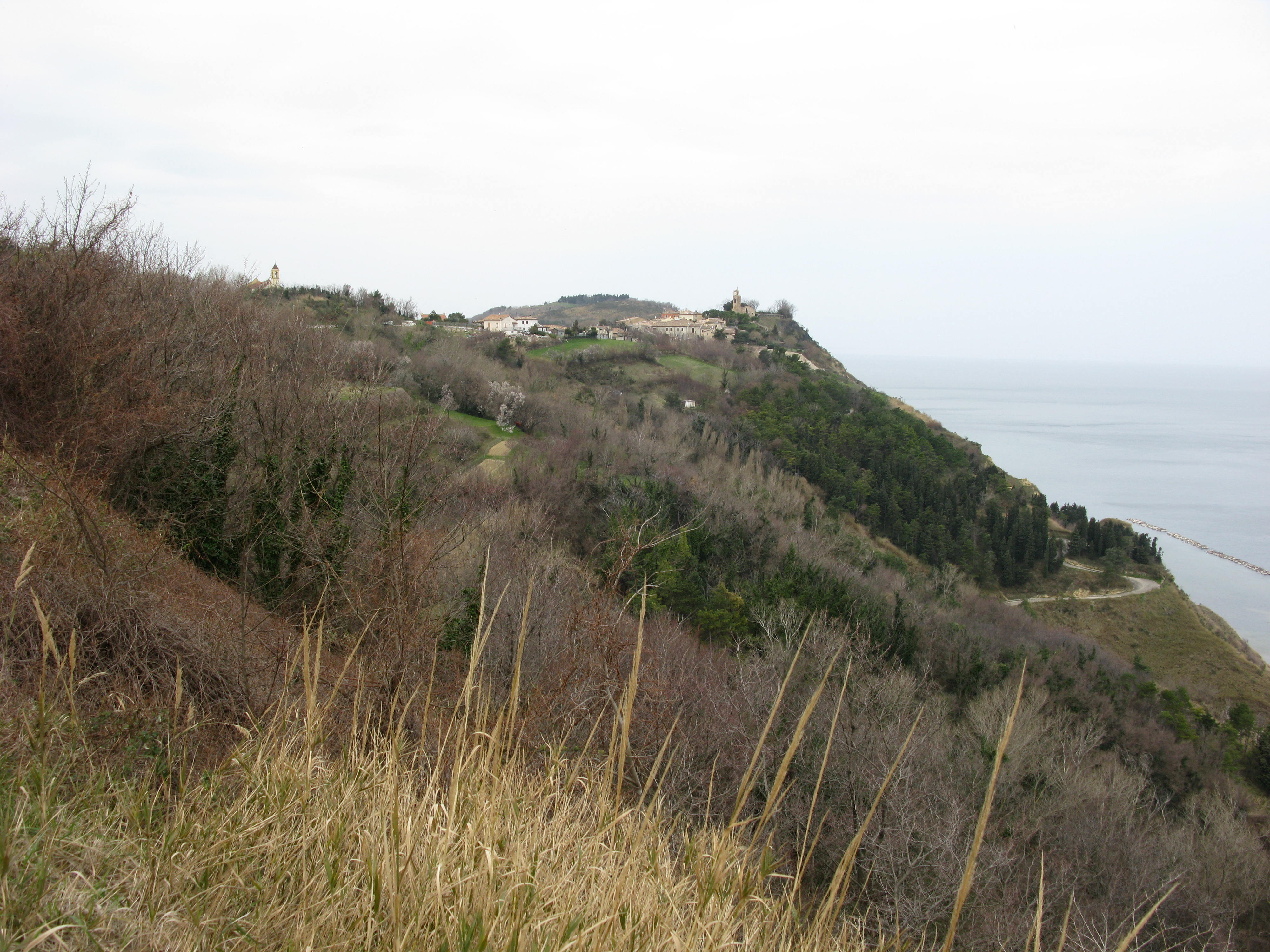 Parco naturale regionale del Monte San Bartolo, sullo sfondo Fiorenzuola di Focara.